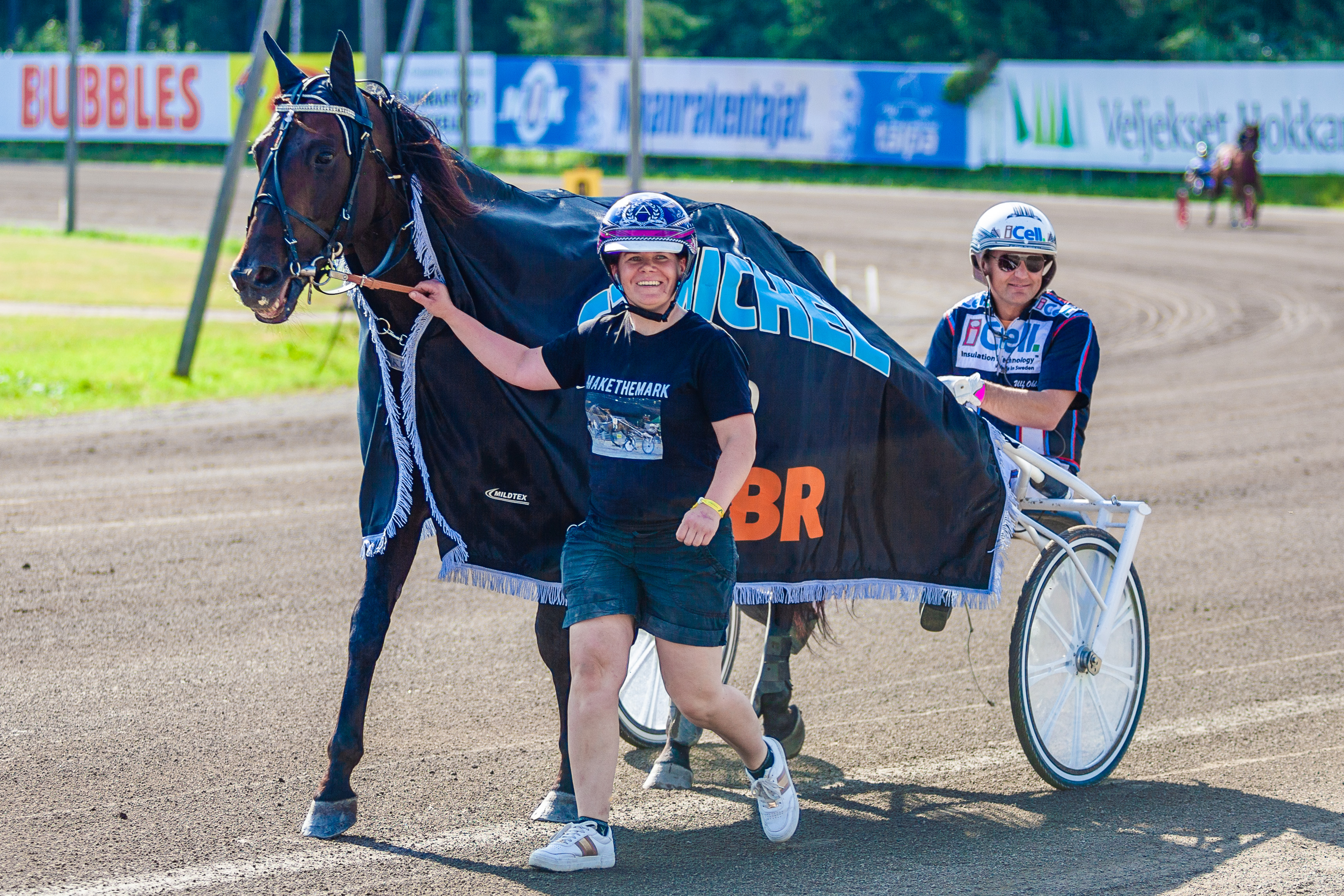 Makethemark, Anne Raatikainen and Ulf Ohlsson at Mikkeli 21.7.2019